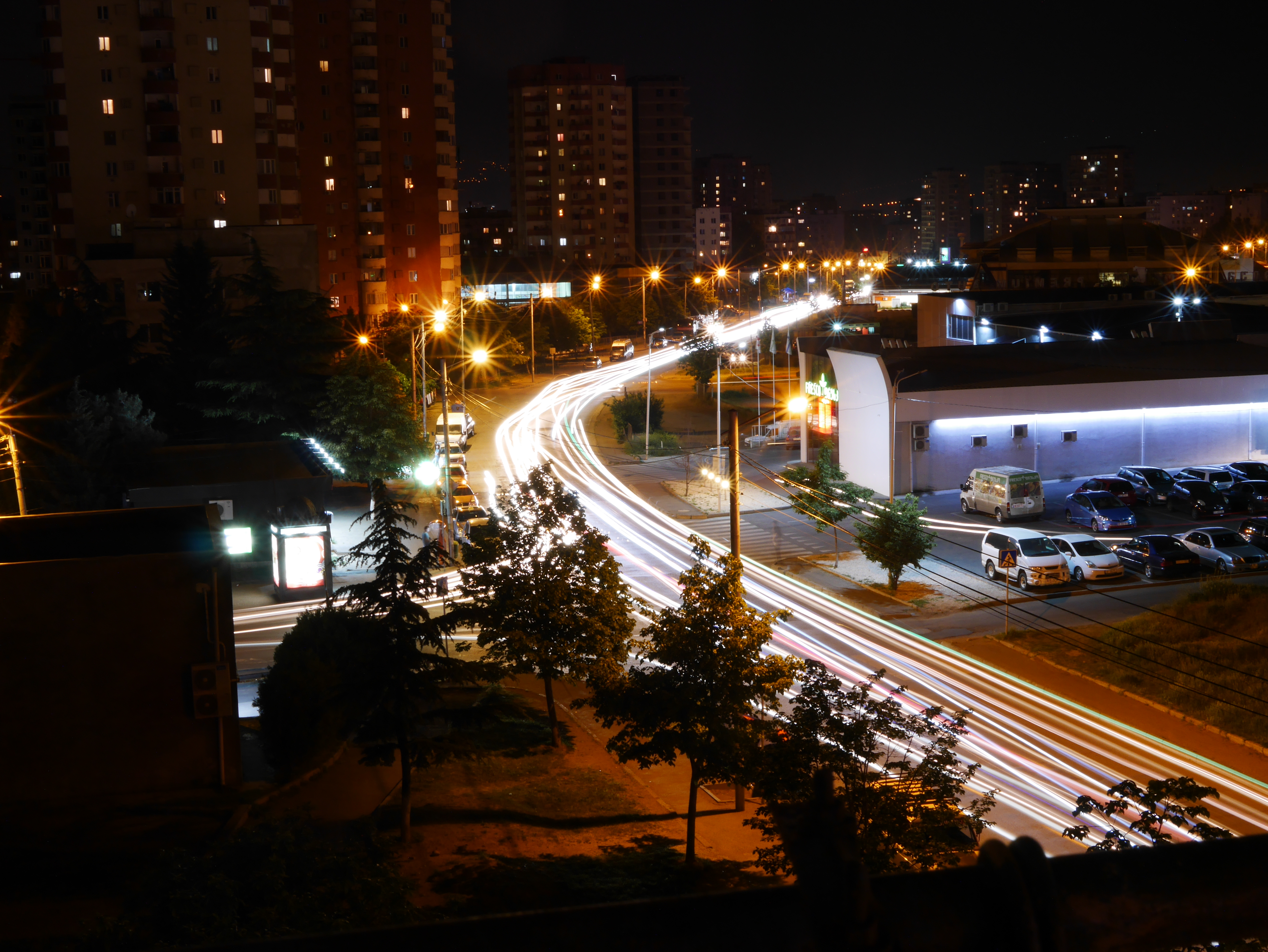 გლდანი ღამით